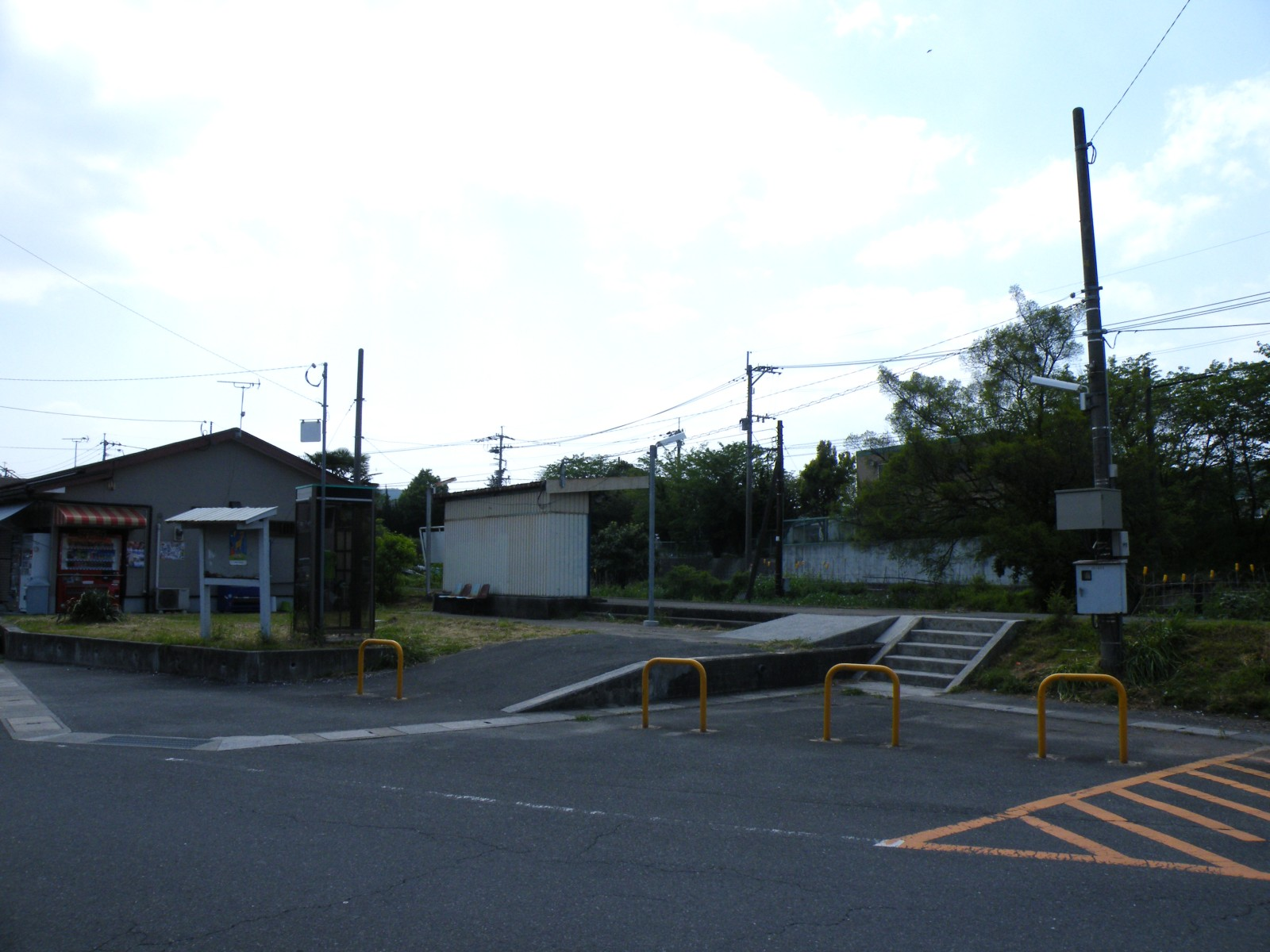 平成筑豊鉄道糸田線豊前大熊駅